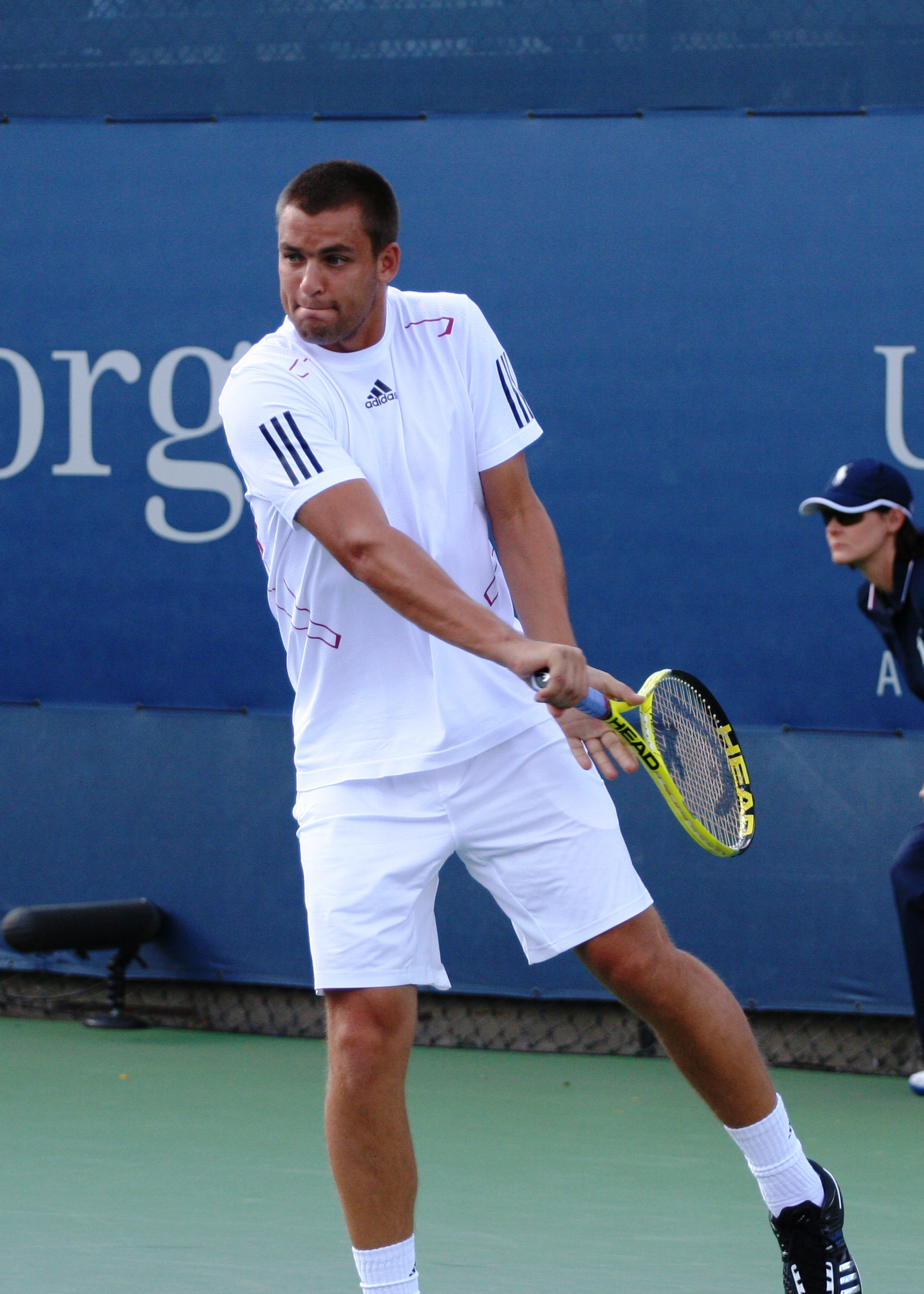 U.S. Open Saturday, Sept. 4, 2010